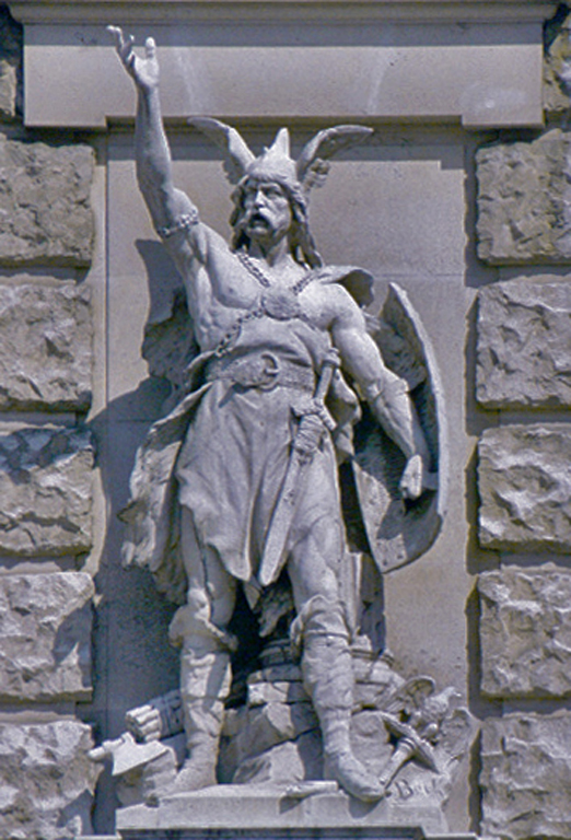 Bajuware (um 1895): Gestalt aus der österreichischen Geschichte von Anton Brenek an der Hauptfassade der Neuen Burg Wien